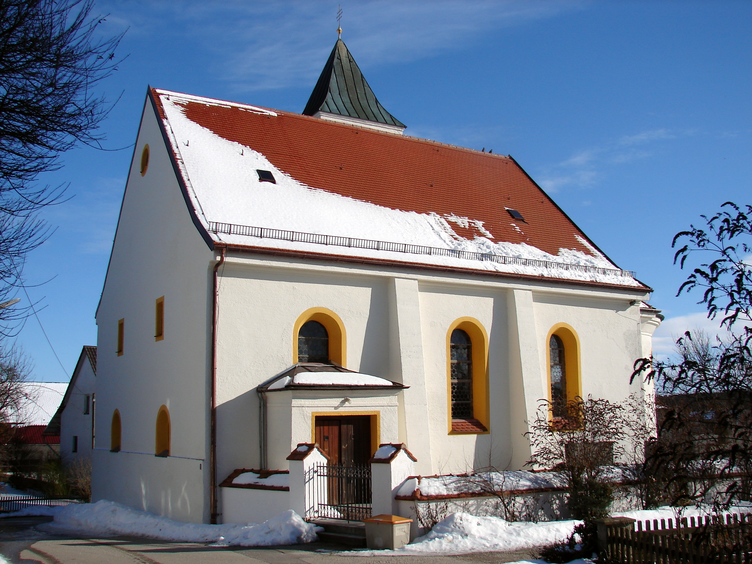 kleiner Saalbau mit östlich angebauter Kapelle und stark eingezogener Apsis, 1921, Chorflankenturm 12. Jh.